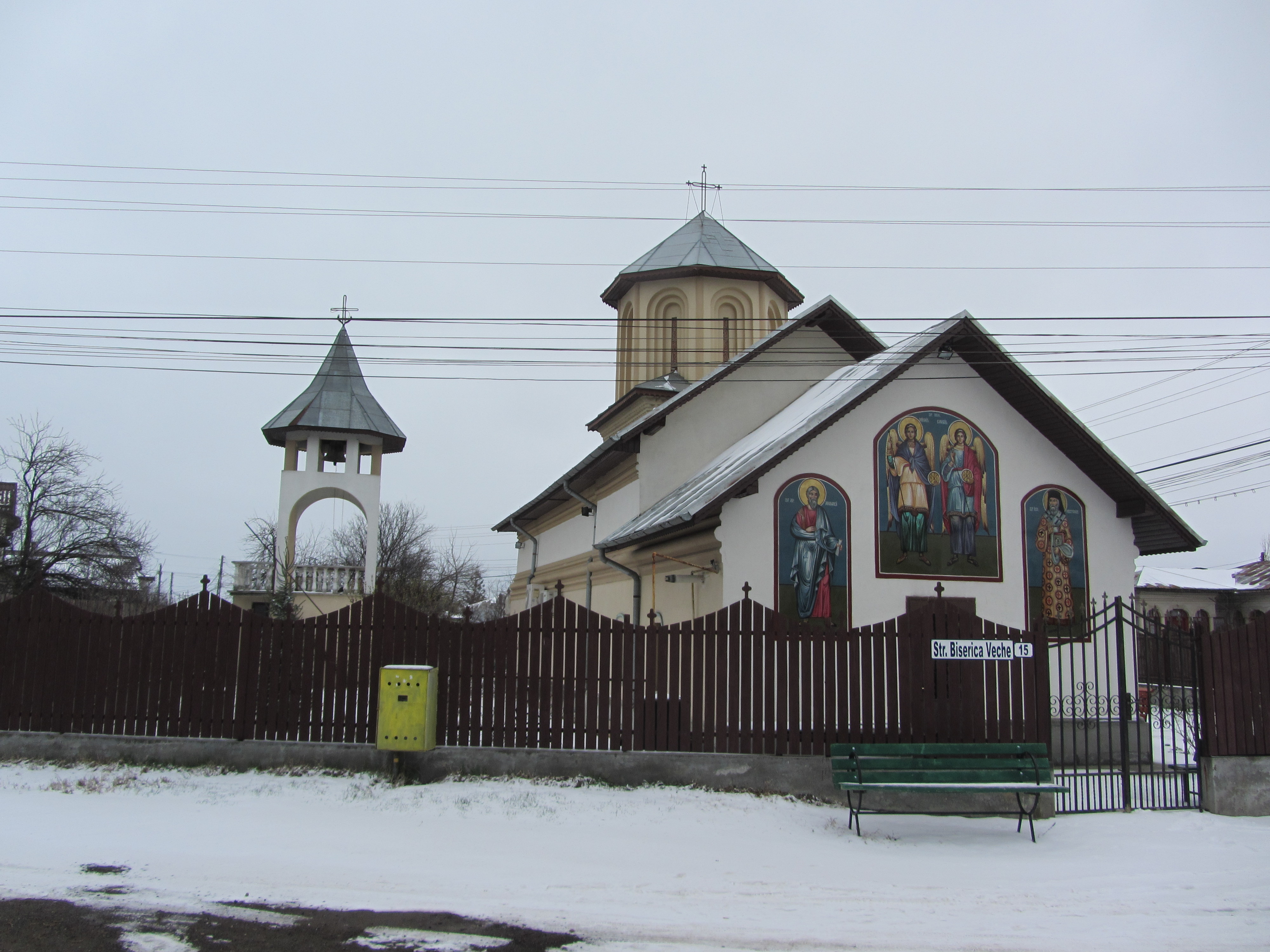 Biserica „Sf. Voievozi”, Sfinții Arhangheli Mihail și Gavril